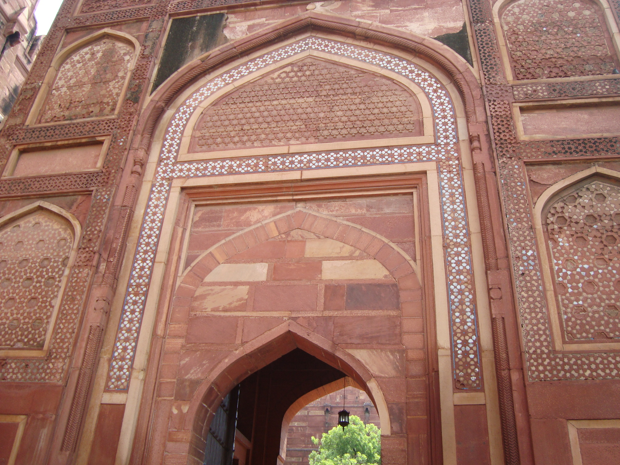 ആഗ്ര കോട്ടയുടെ കവാടം